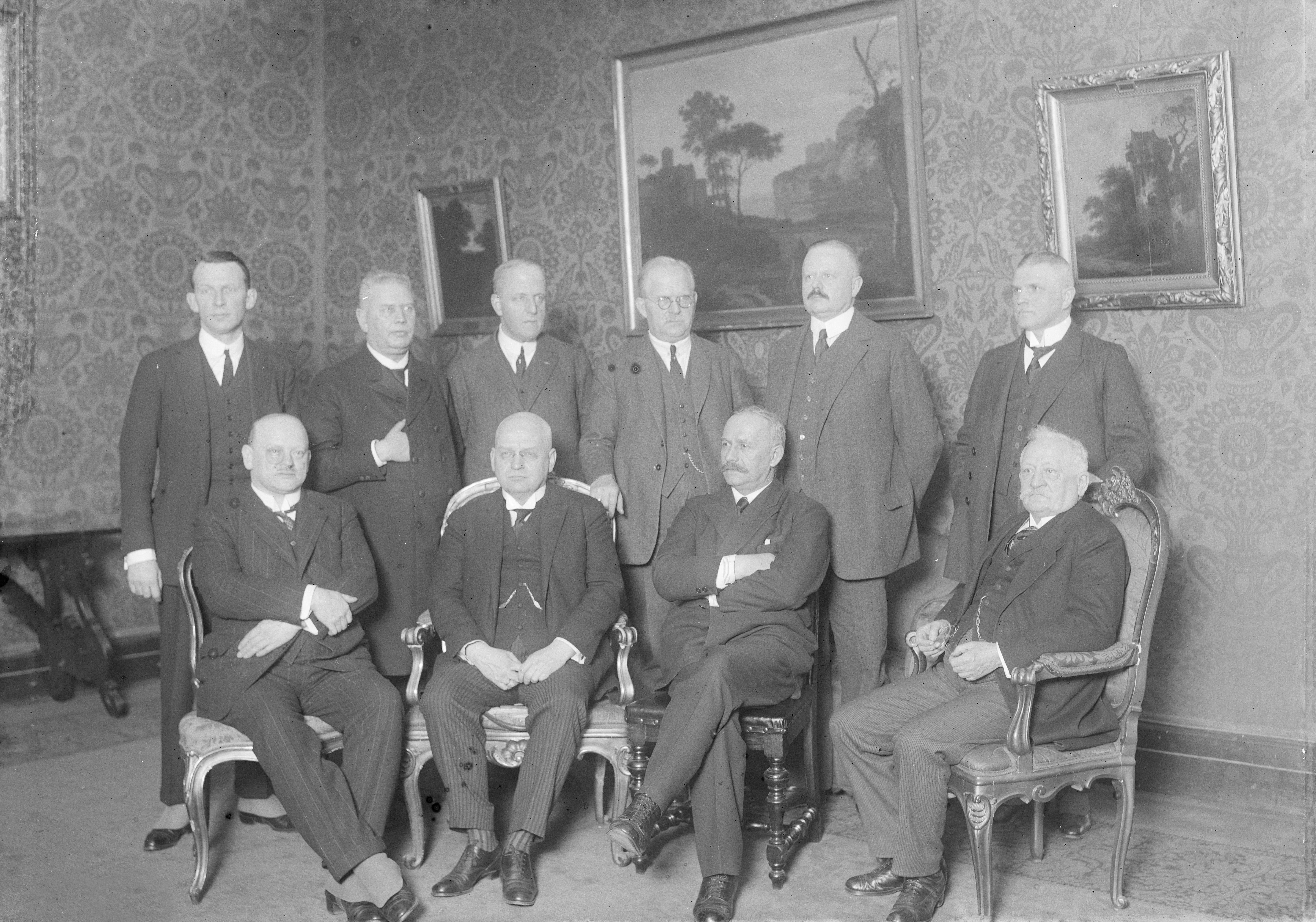 Das Kabinett Luther zurückgetreten. Einzige Gesamtaufnahme des Kabinetts Luther anlässlich wichtiger politischer Besprechungen im Reichskanzler-Palais. Sitzend v. links: Dr. Stresemann (Äusseres), Dr. Luther (Reichskanzler), Schiele (Inneres), Franken (Reichsjustiz) Stehend v. links nach rechts: Graf Kanitz (Ernährung), Brauns (Reichsarbeit), Neuhaus (Reichswirtschaft), Stingl (Reichspost), Krohne (Reichsverkehr), Dr. v. Schlieben (Finanzen) Ende 1925 Information added by Wikimedia users.Kabinett Luther I 15. Januar 1925 – 20. Januar 1926